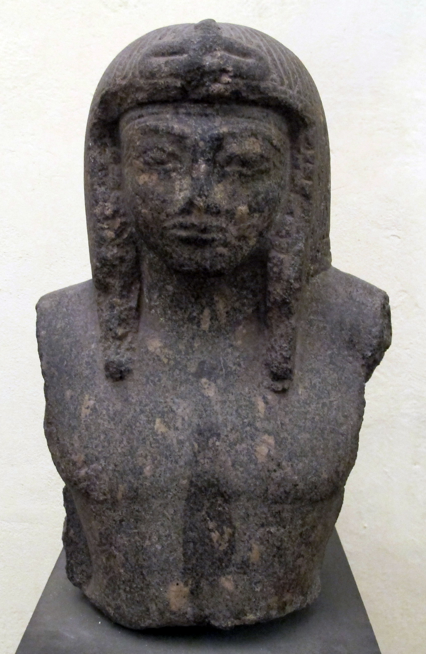 Ancient Egyptian art in the Museo archeologico nazionale (Florence)